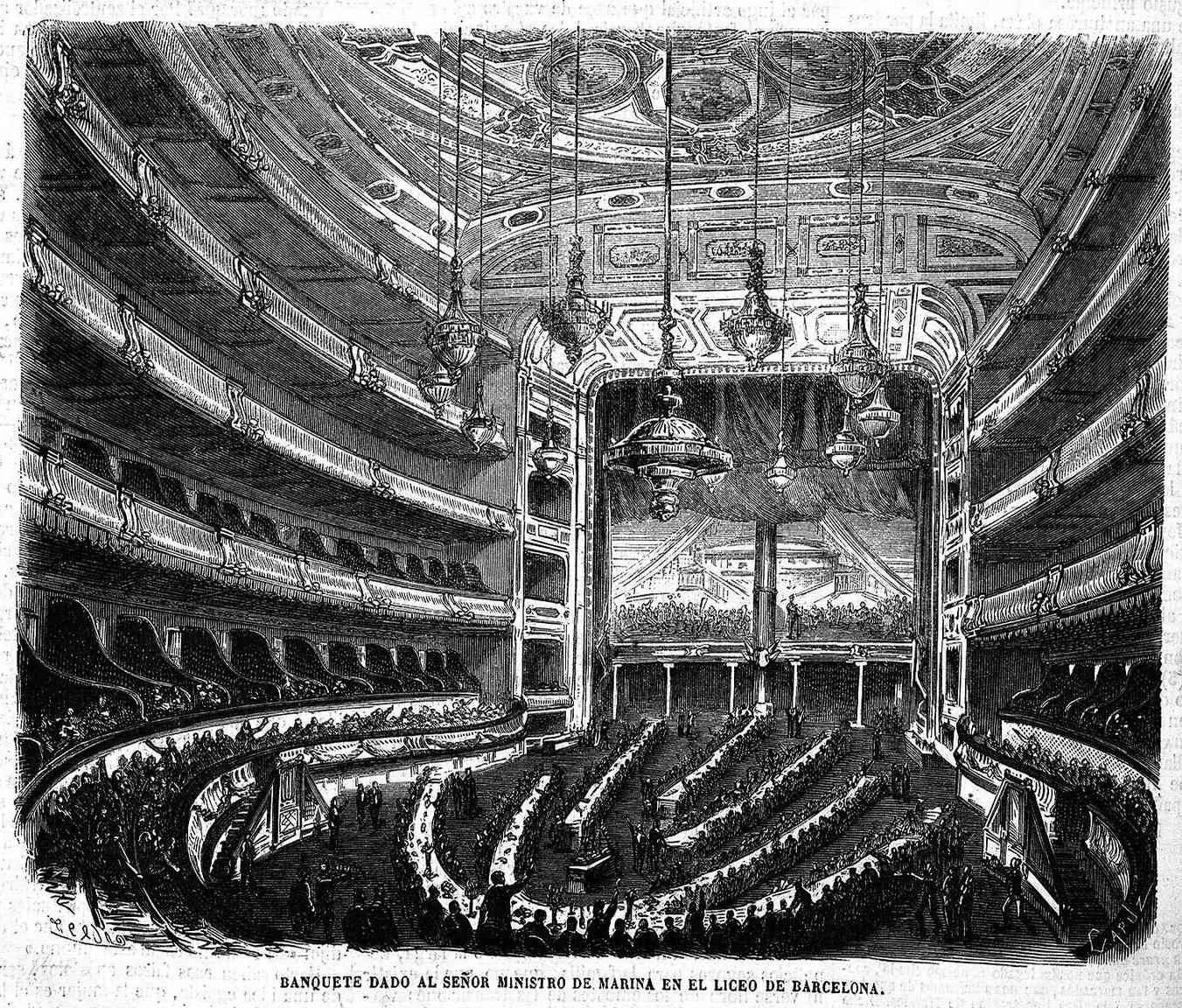 «Banquete dado al señor ministro de Marina en el Liceo de Barcelona», en la revista española El Museo Universal.